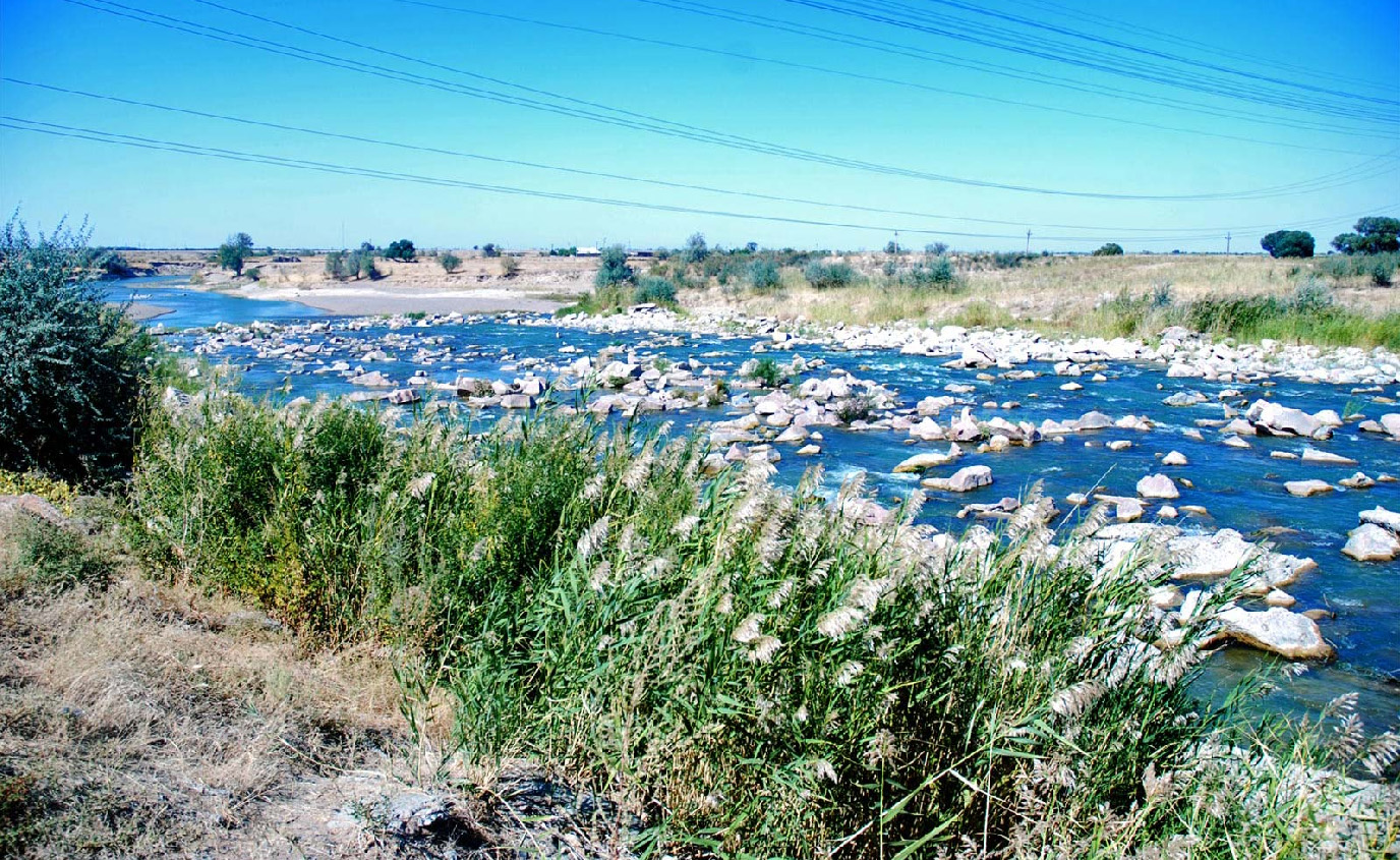 Чу, платина